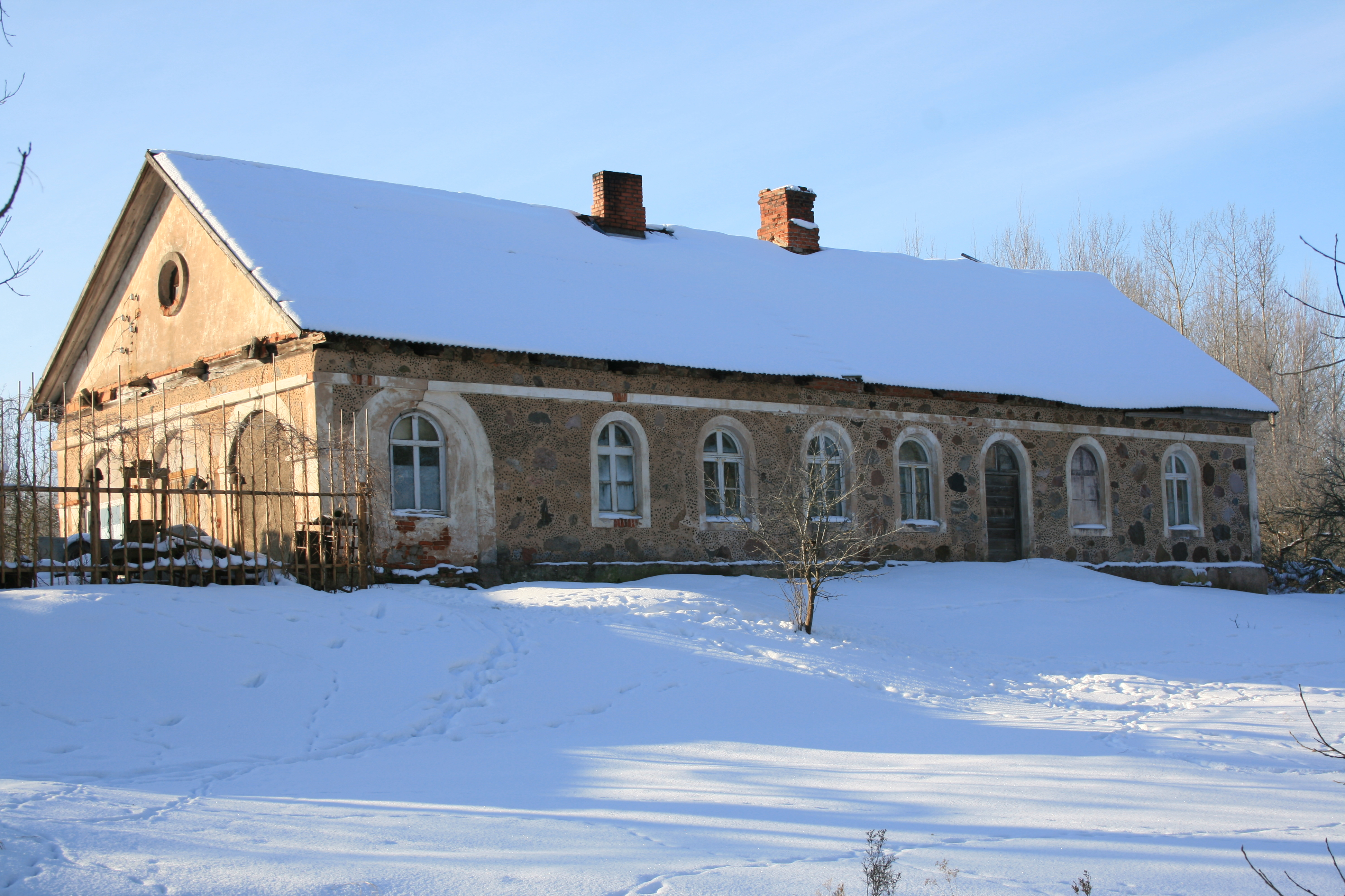 Beļavas muižas saimniecības ēka